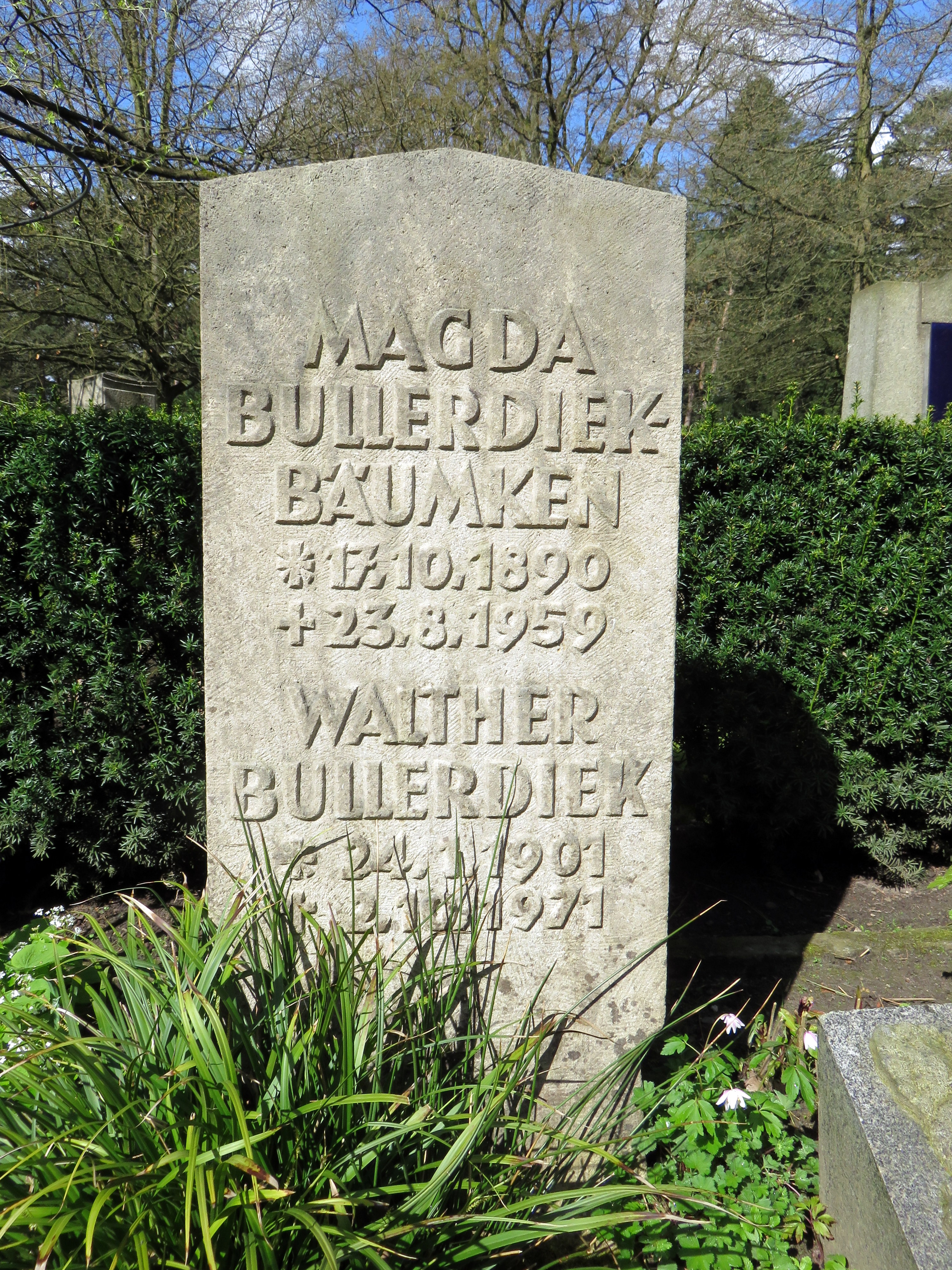 Historischer Grabstein für die deutsche Theaterschauspielerin Magda Bäumken im Bereich des Gartens der Frauen auf dem Ohlsdorfer Friedhof in Hamburg-Ohlsdorf.